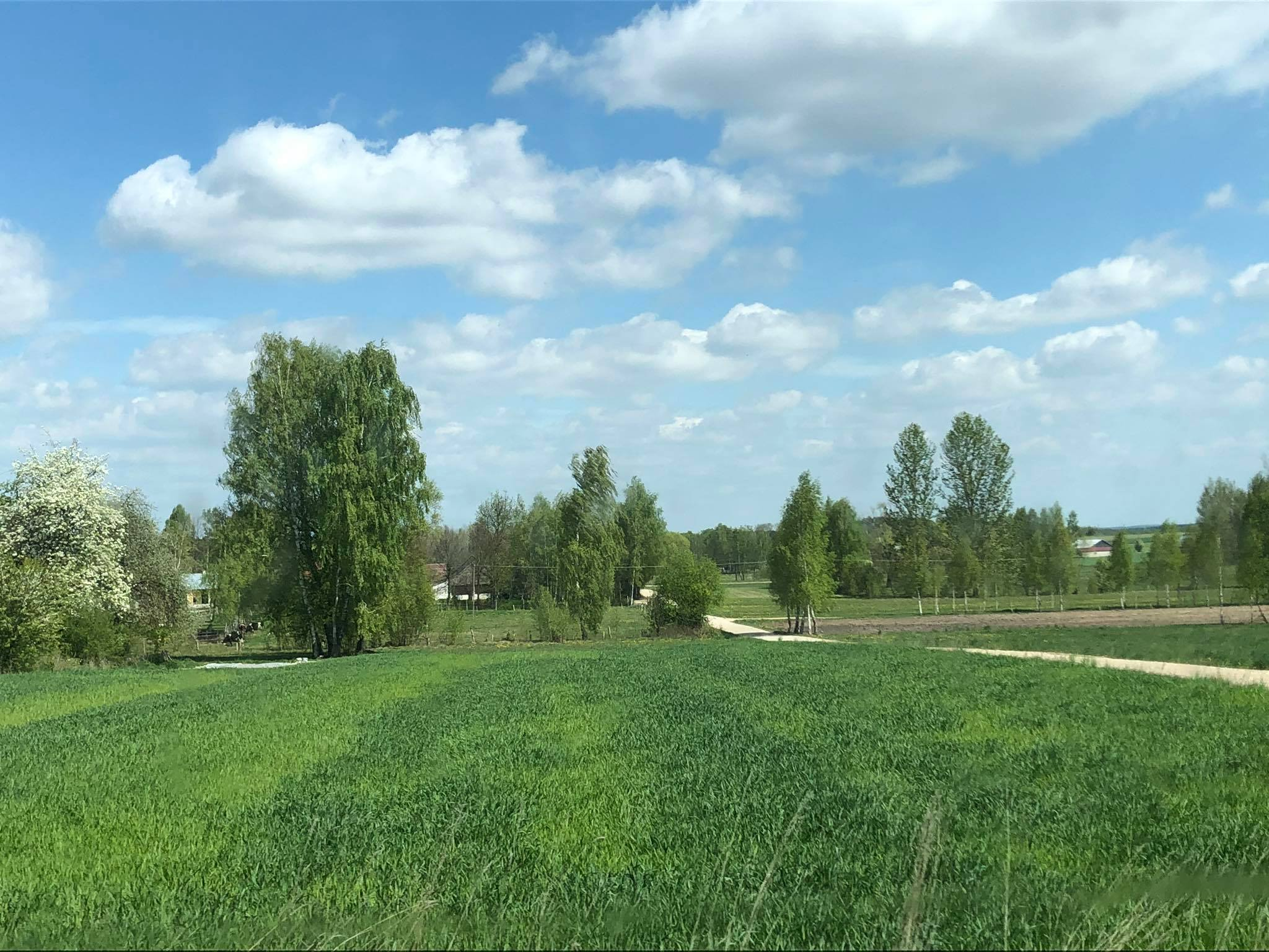 Wieś Bieniowce-Kolonia